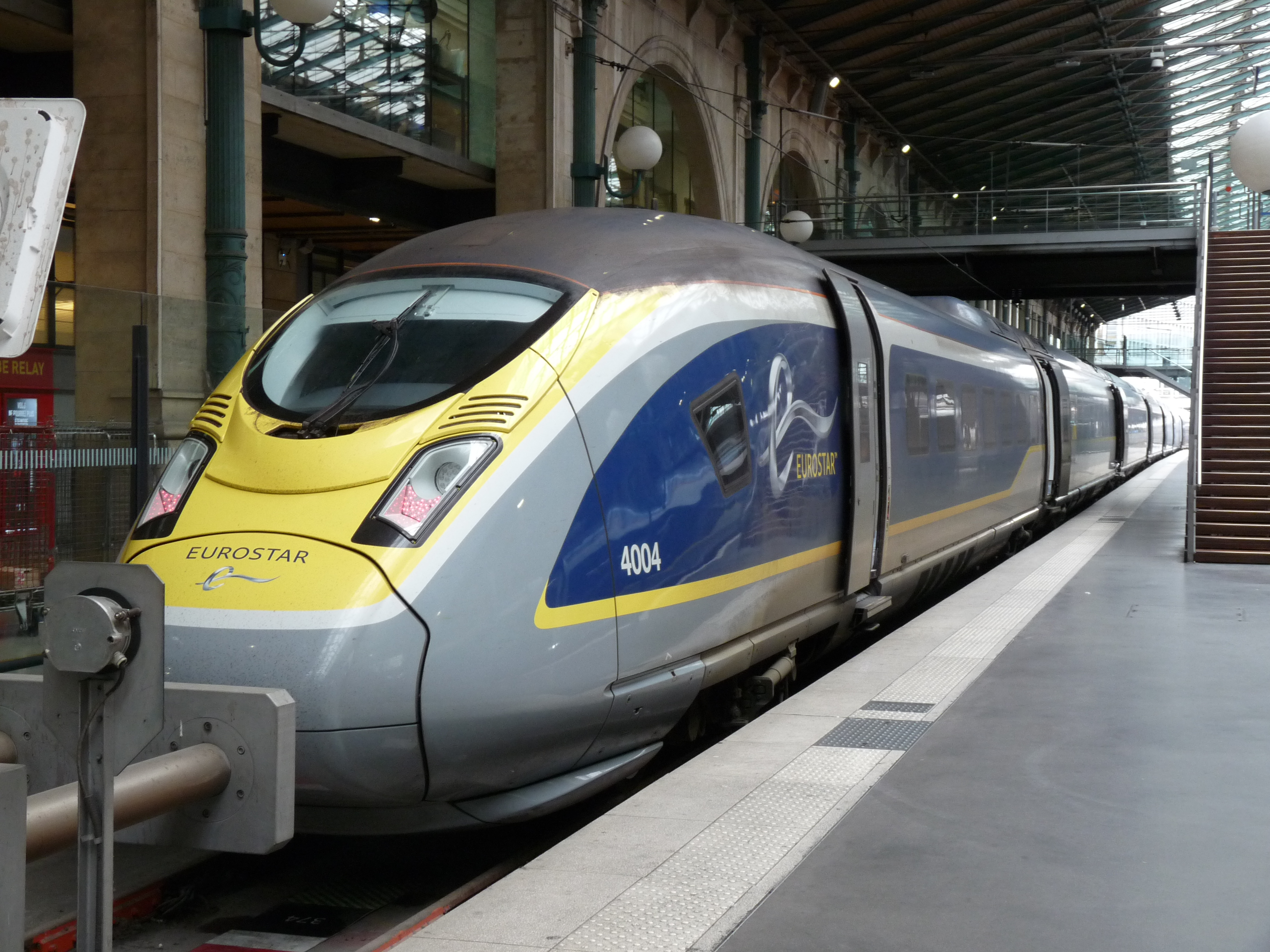 De nieuwe Eurostartrein in Paris Nord